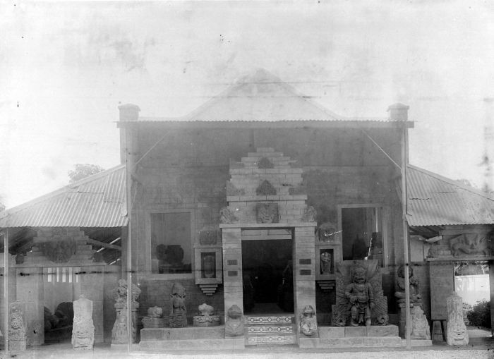 Negatief. Museum in Modjokerto